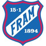 Dette er logoen til Idrettsforeningen Fram